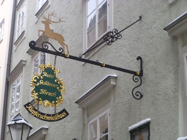 Hotel_Goldener_Hirsch-Depandance